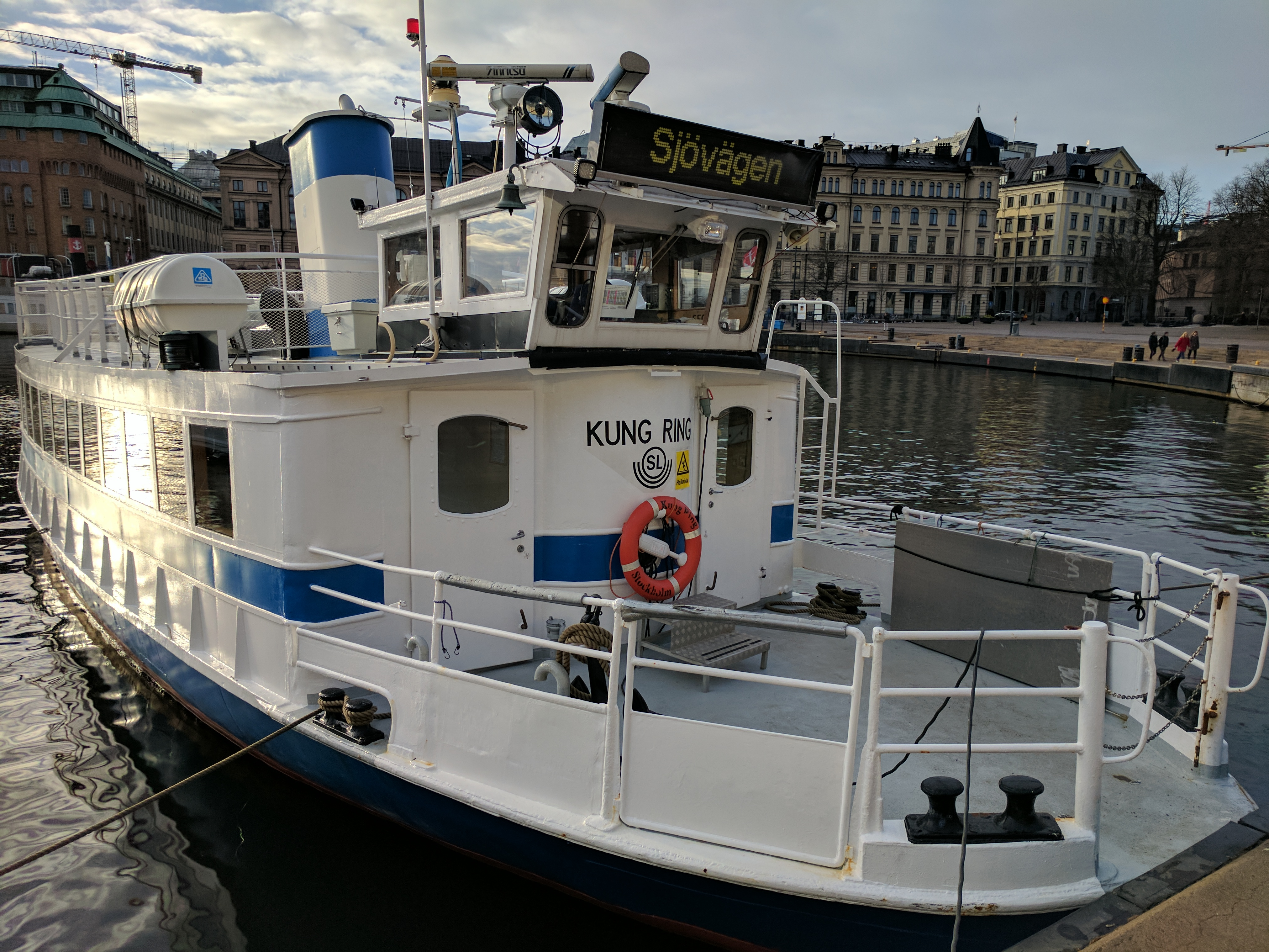 M/S Kung Ring